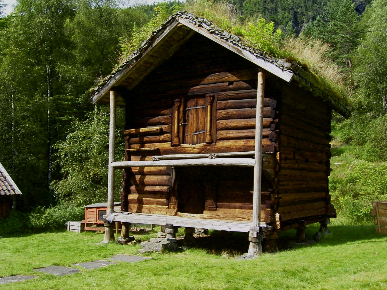 Guggedalsloftet, medieval loft